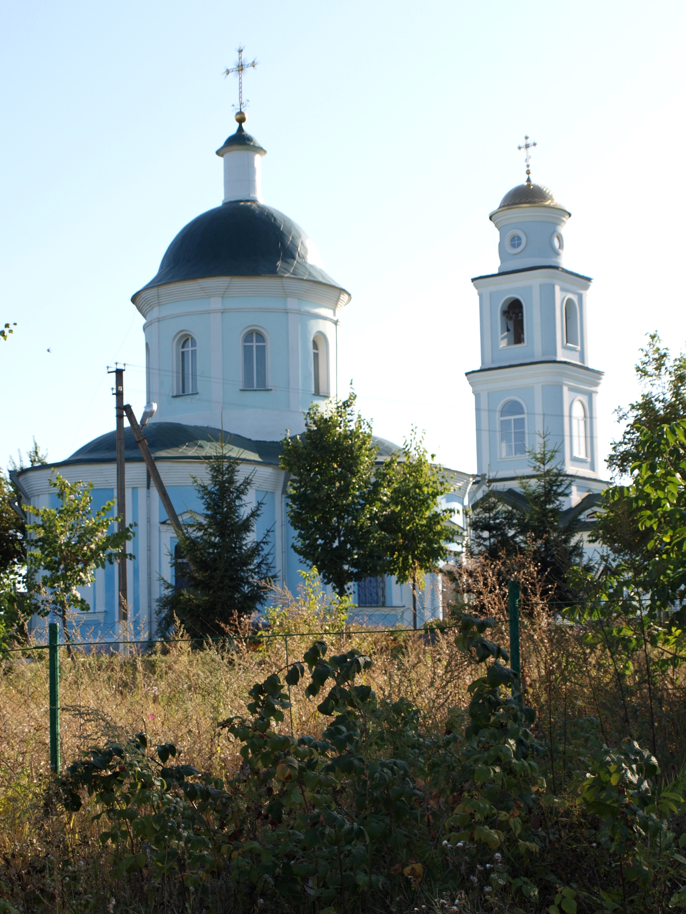 Вознесенська церква Покровського монастиря, Полтава, Зоряна вул., 2